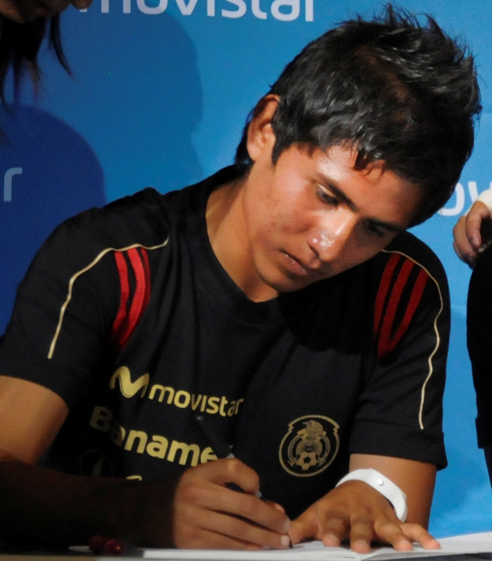 Los jugadores de la Sub 17, actuales campeones del mundo, visitaron la Campus Party Powered by Movistar